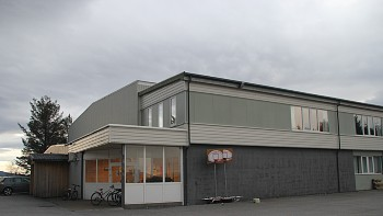 Godøyhallen